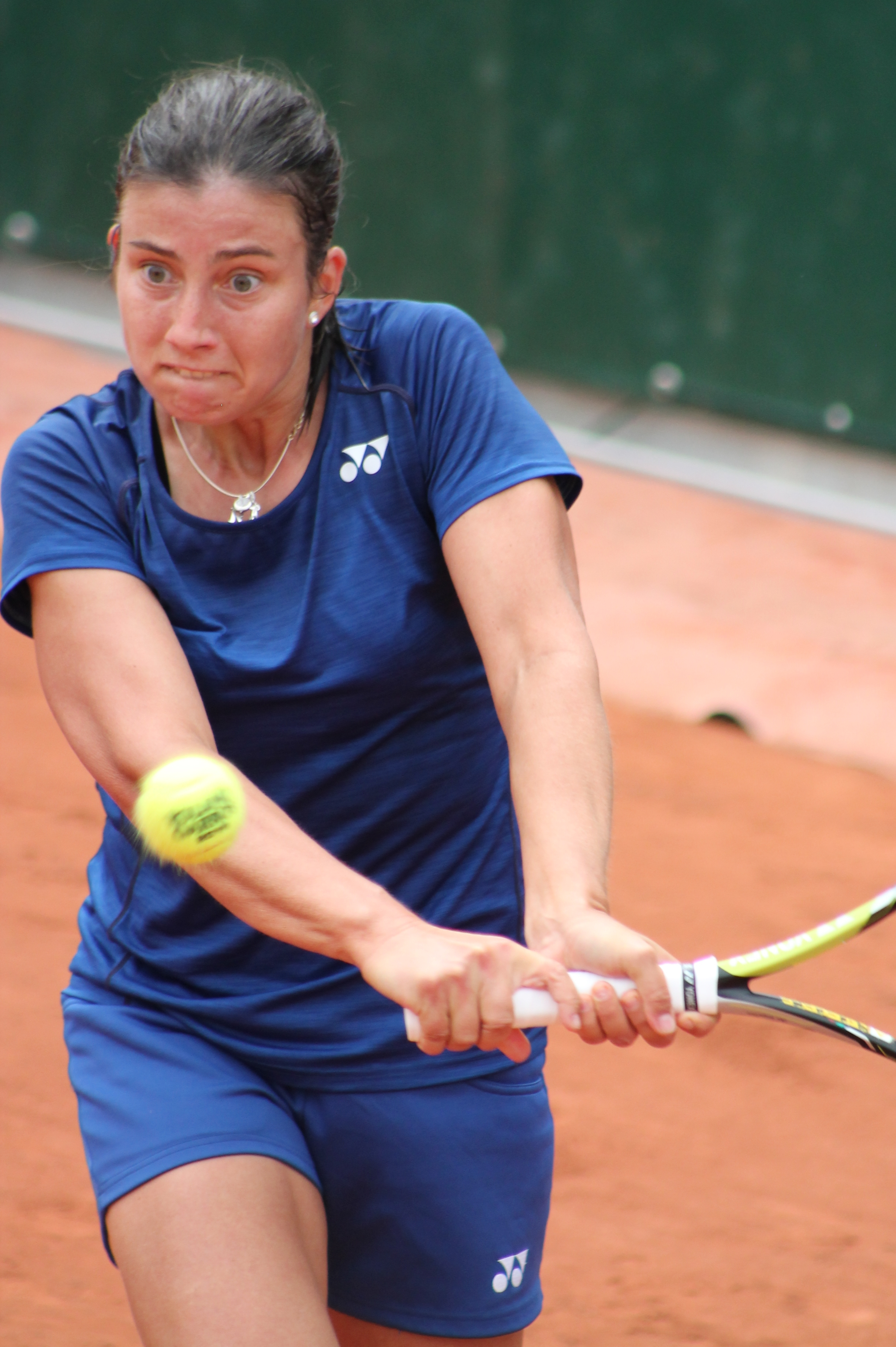 Sevastova RG16 (28)